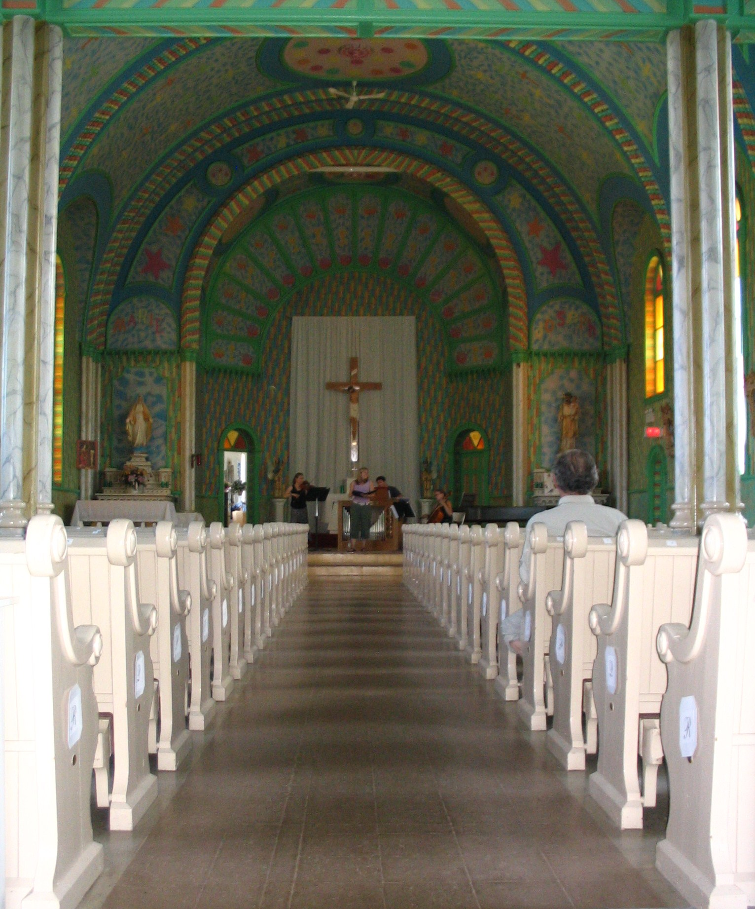 Église Sainte-Cécile, Petite-Rivière-de-l'Île, Nouveau-Brunswick